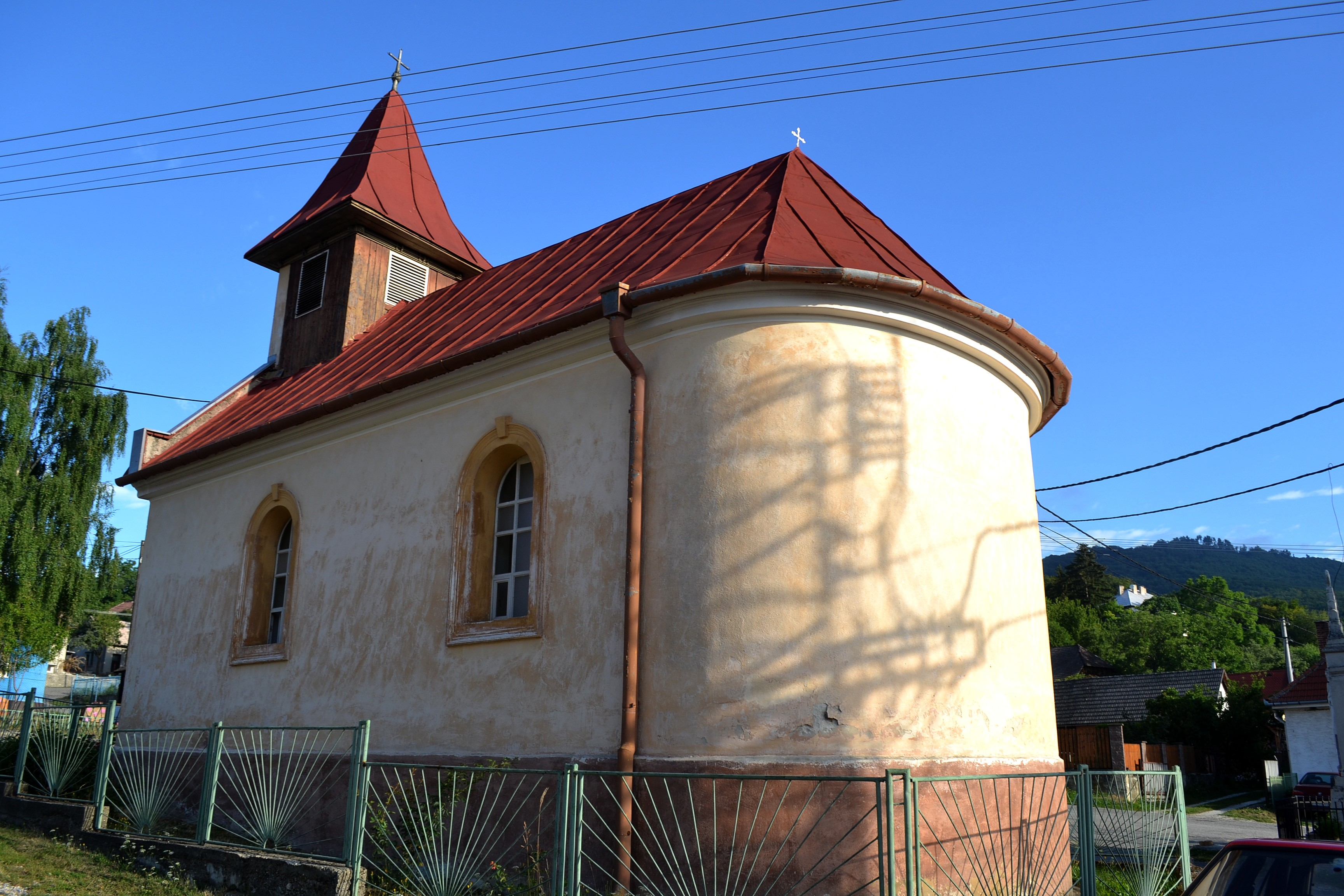 Nová Lehota (okr. Nové Mesto nad Váhom), Kaplnka svätého Antona Padovského